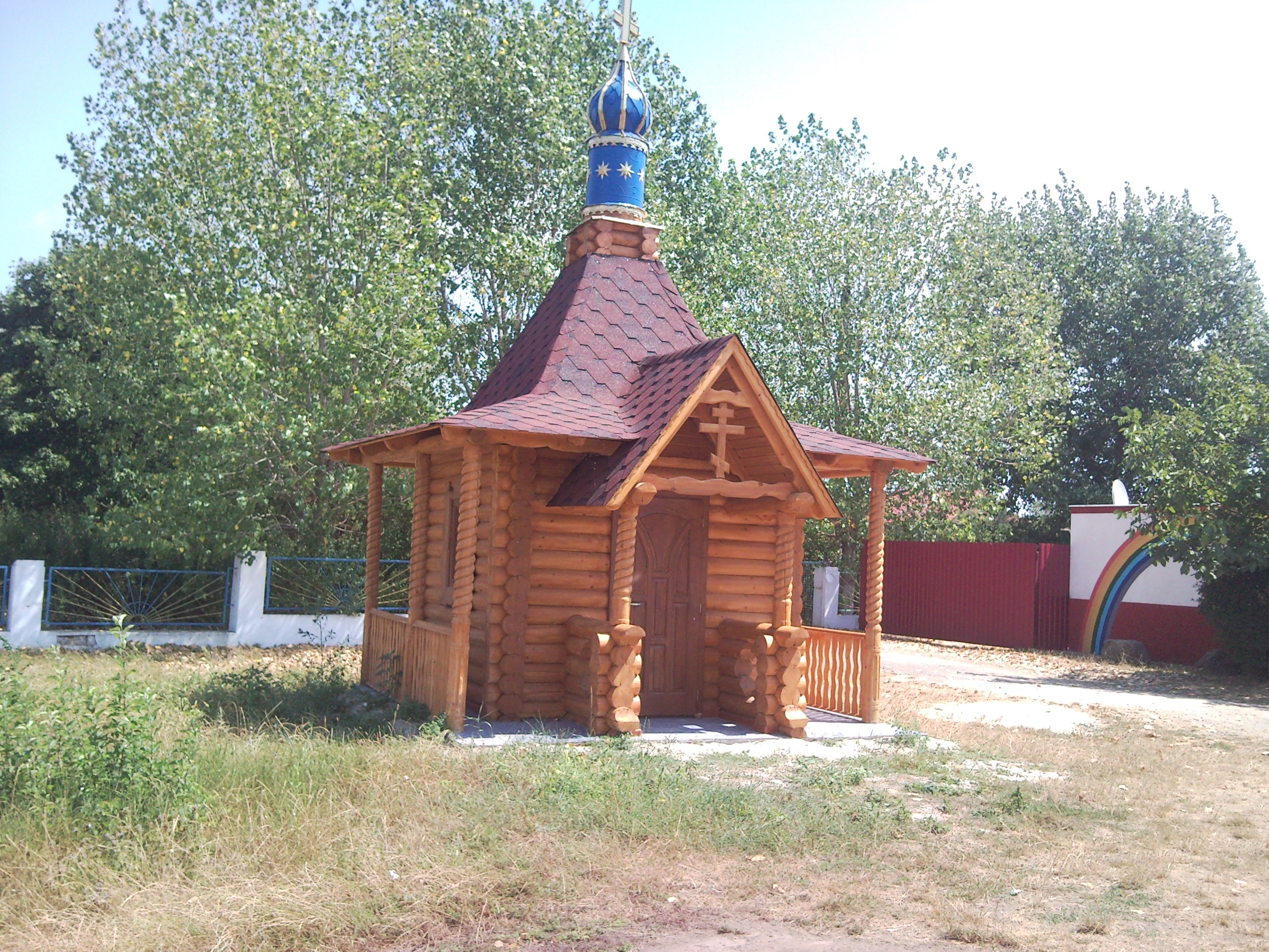 Капличка Лебедівка